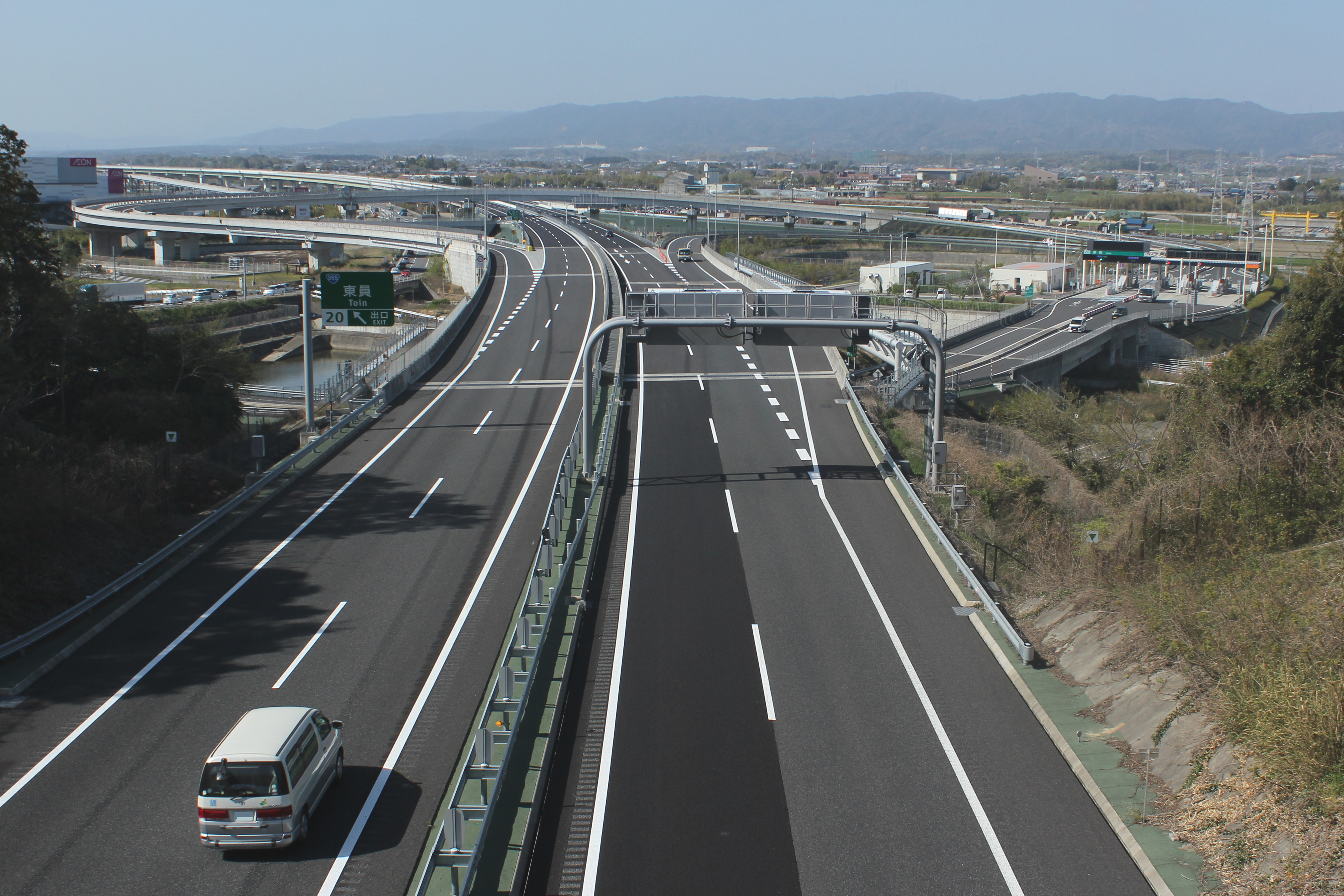 C3東海環状自動車道 東員インターチェンジ付近